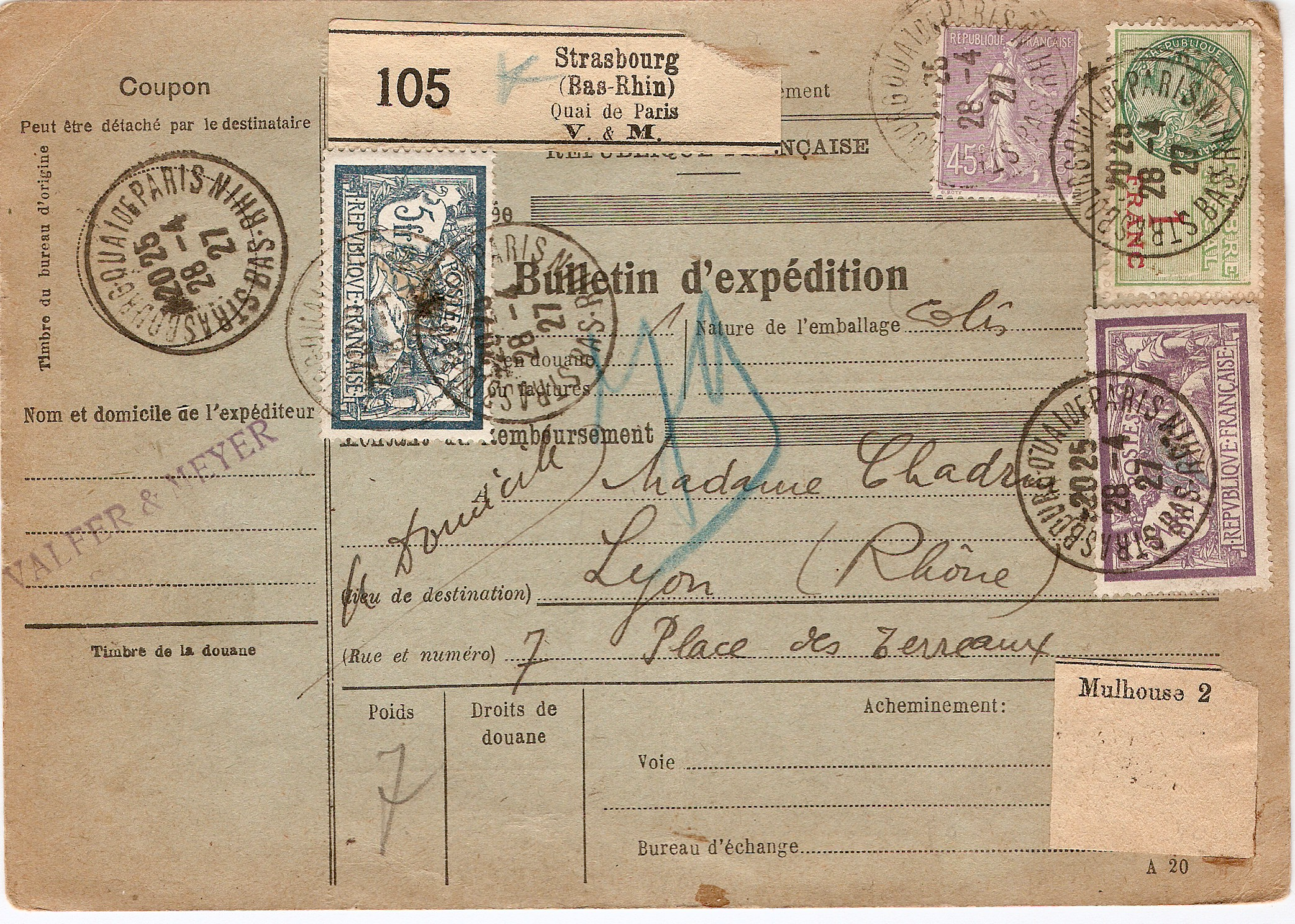 Bulletin d'expédition de colis postal en 1927 contenant notamment deux timbres au Type Merson et un timbre fiscal.